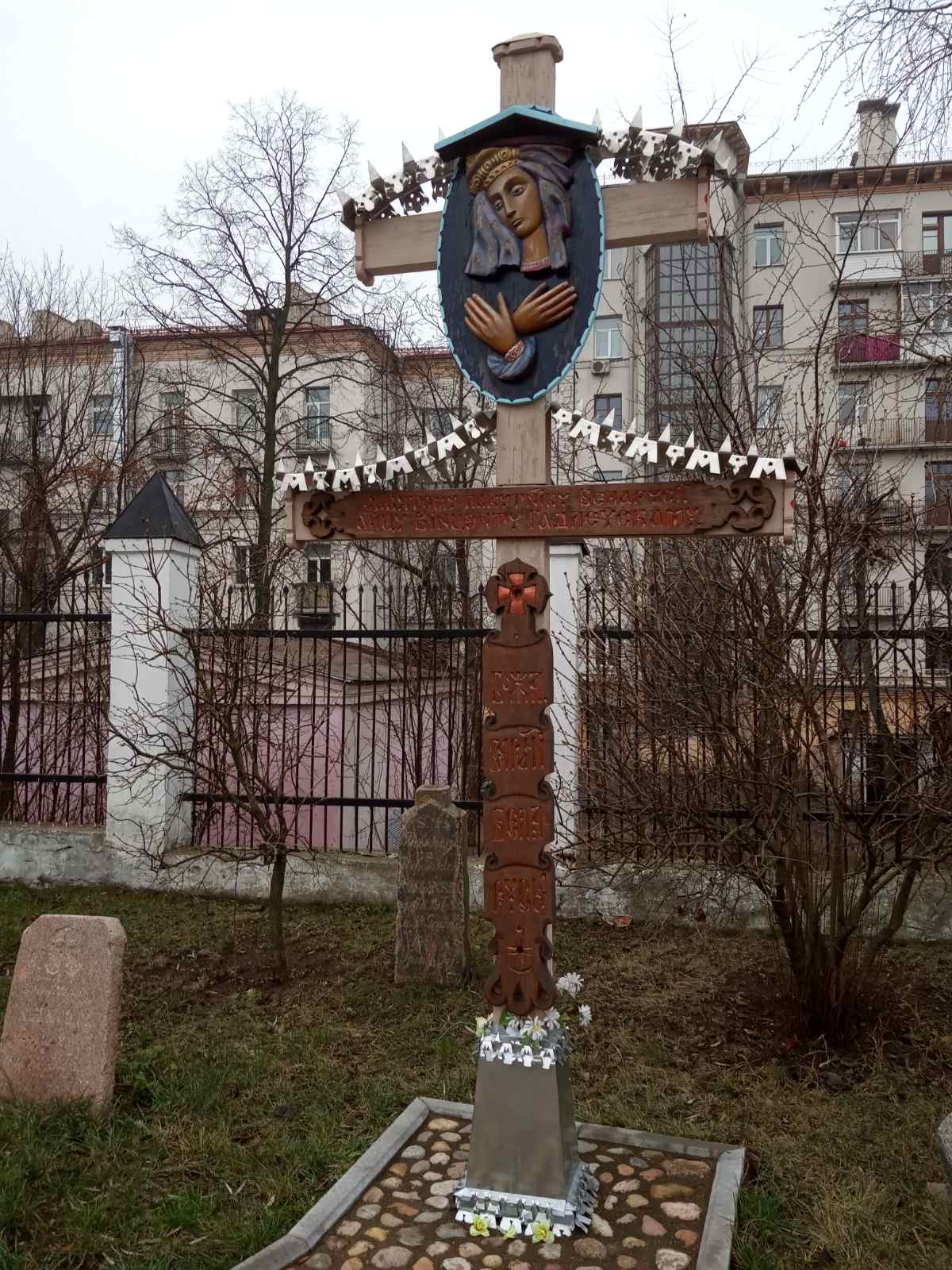 Памятны крыж ксяндзу Вінцэнту Гадлеўскаму ва ўрочышча Трасцянец, пераўсталяваны ля касцёла Святога Роха ў Мінску (2009)